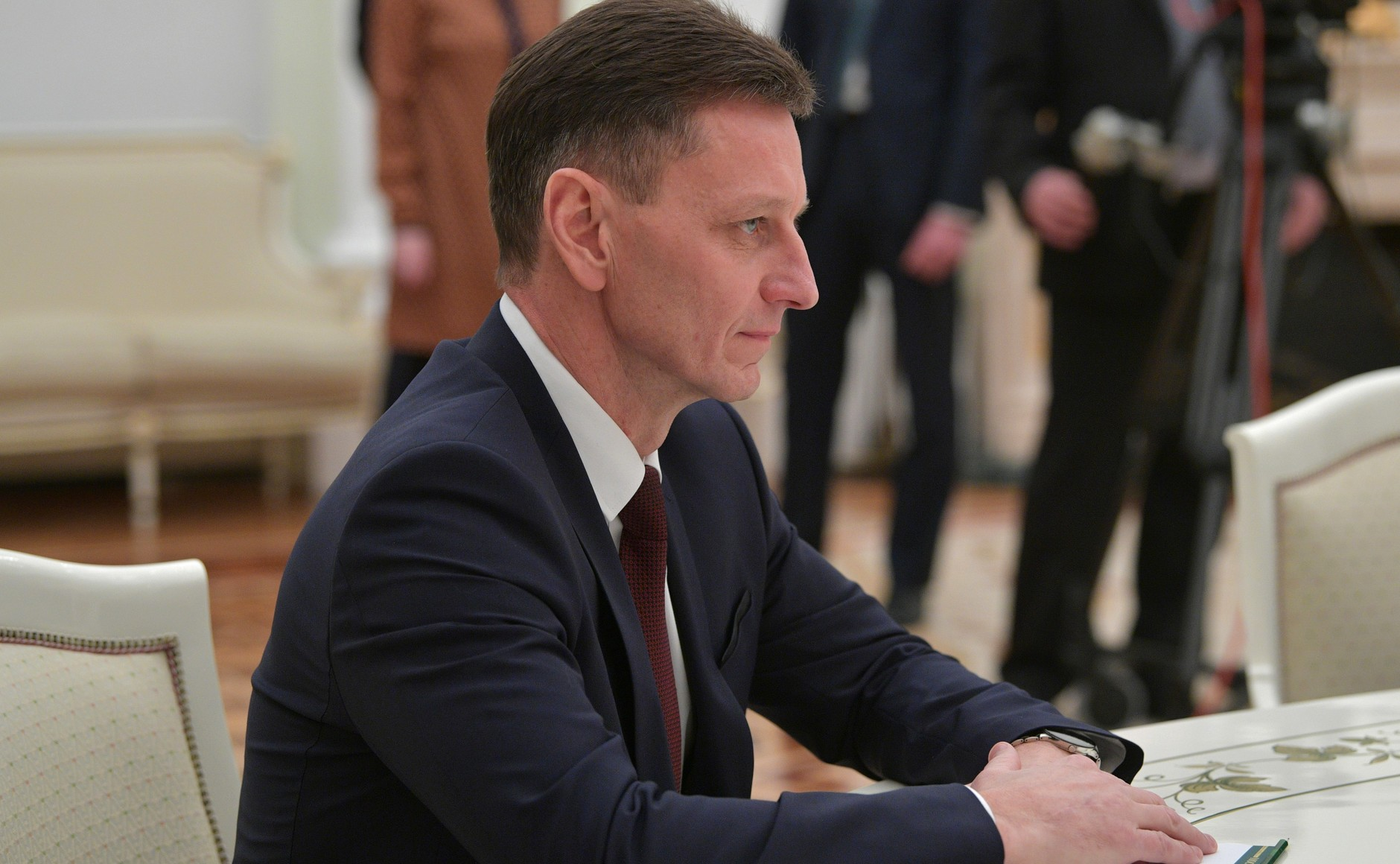 Губернатор Владимирской области Владимир Сипягин во время встречи с Президентом России Владимиром Путиным